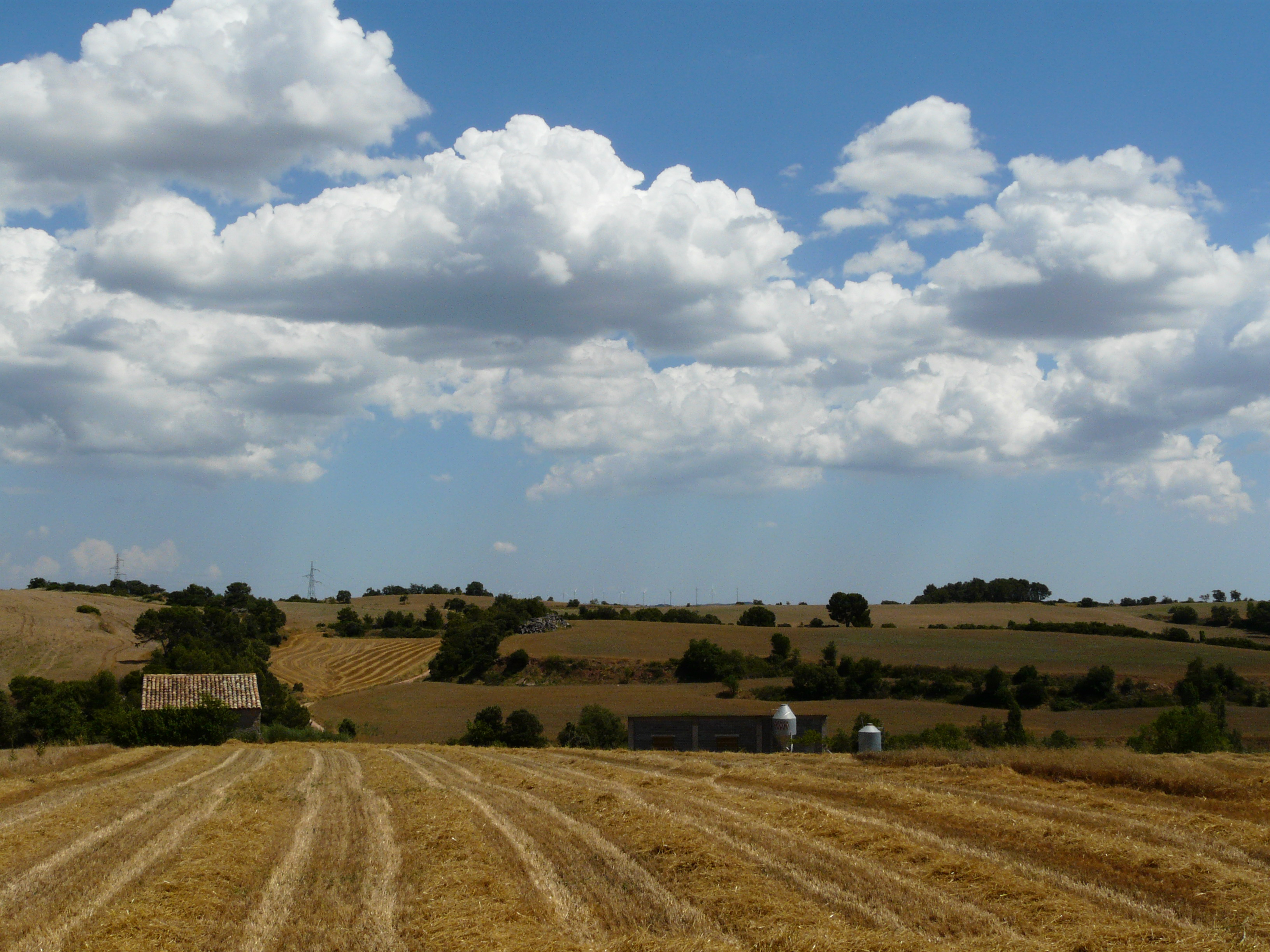 Camps segats als volts de Sant Valentí de Vilallonga, a Sant Martí Sesgueioles (Anoia).